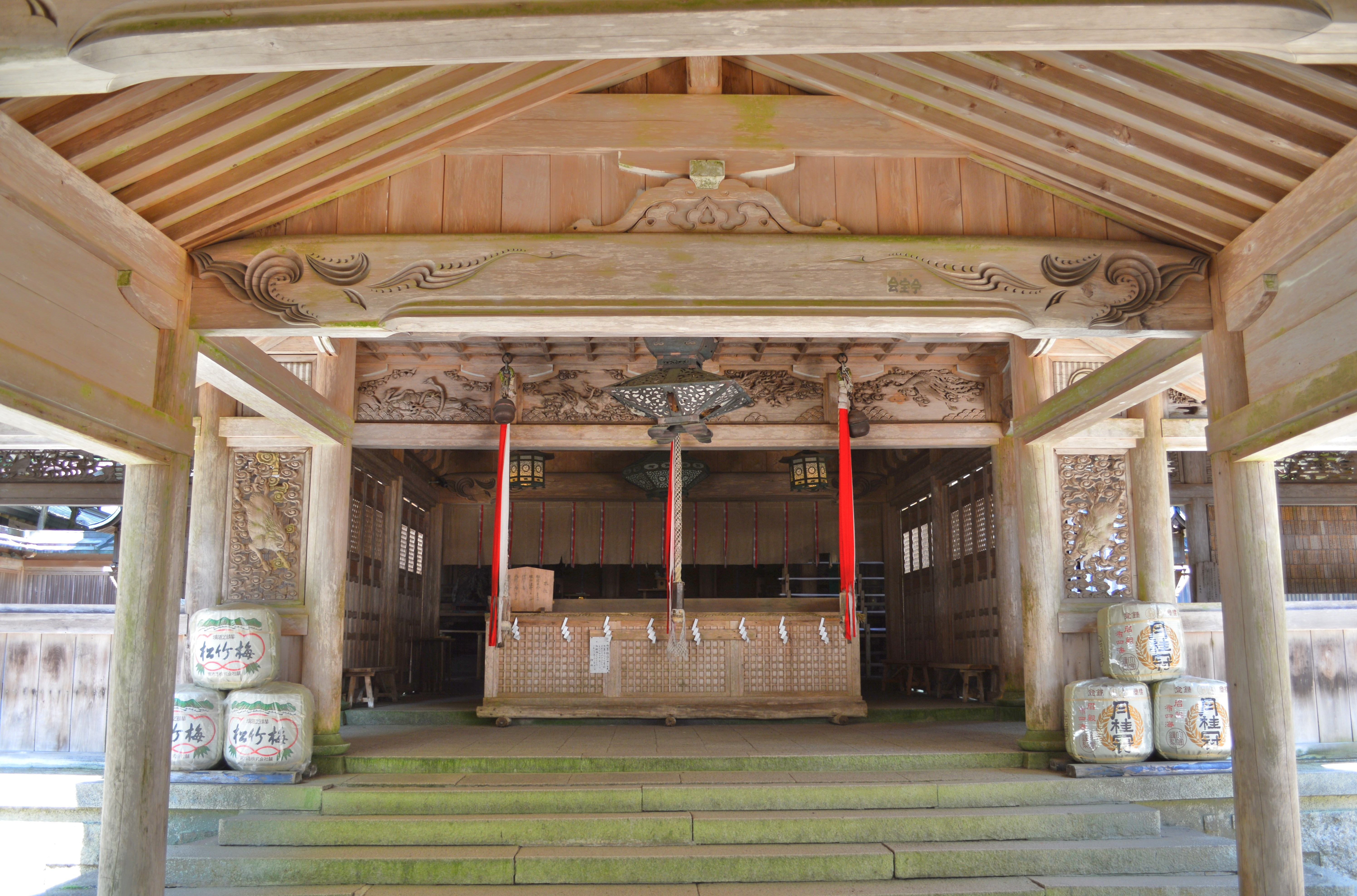 愛宕神社 (京都市) 本殿内部